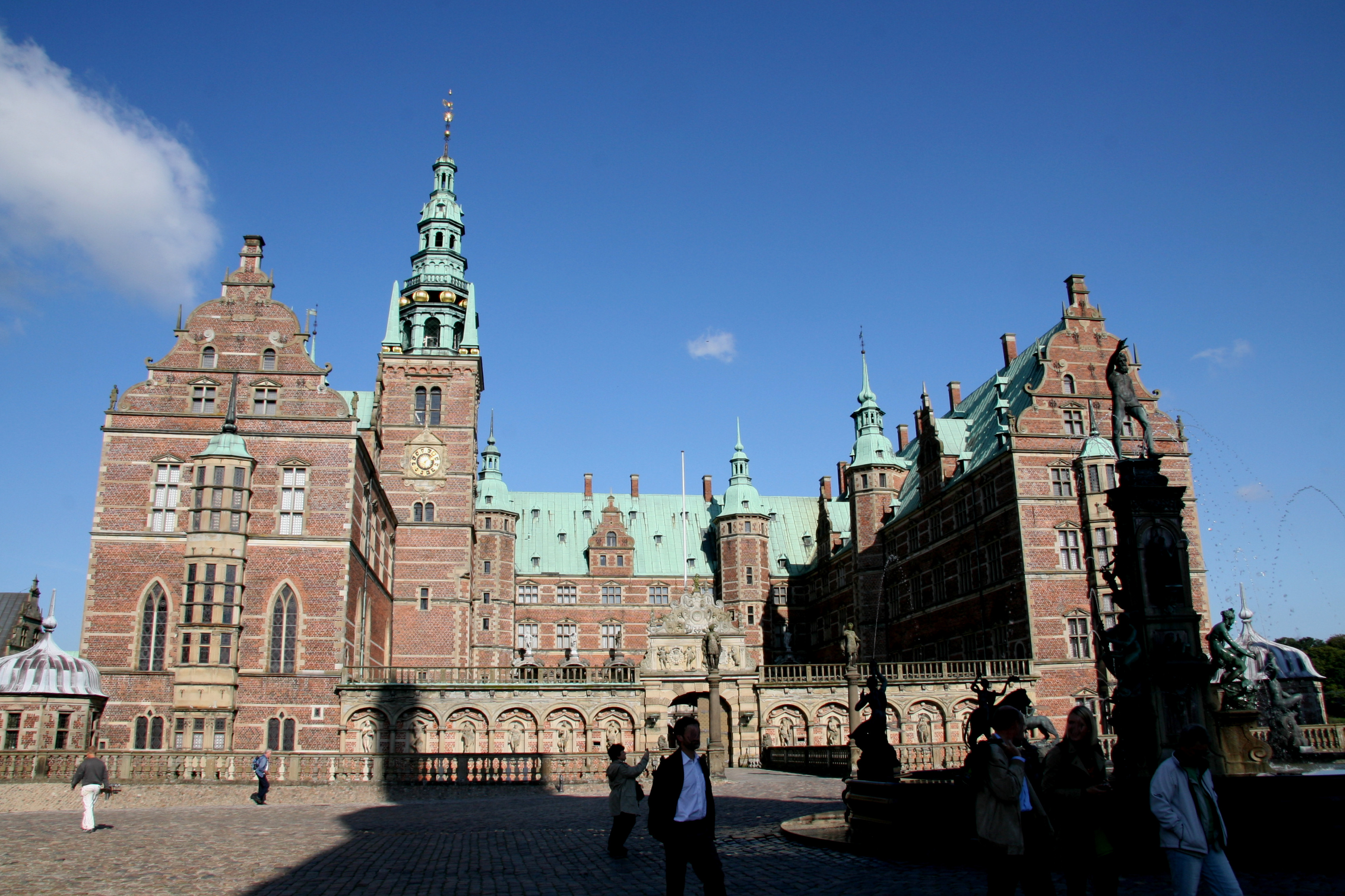 Frederiksborg Slot, Hillerød, Denmark. Outer courtyard